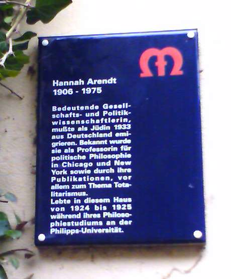 Gedenktafel an Hannah Arendt in Marburg, Lutherstraße 4